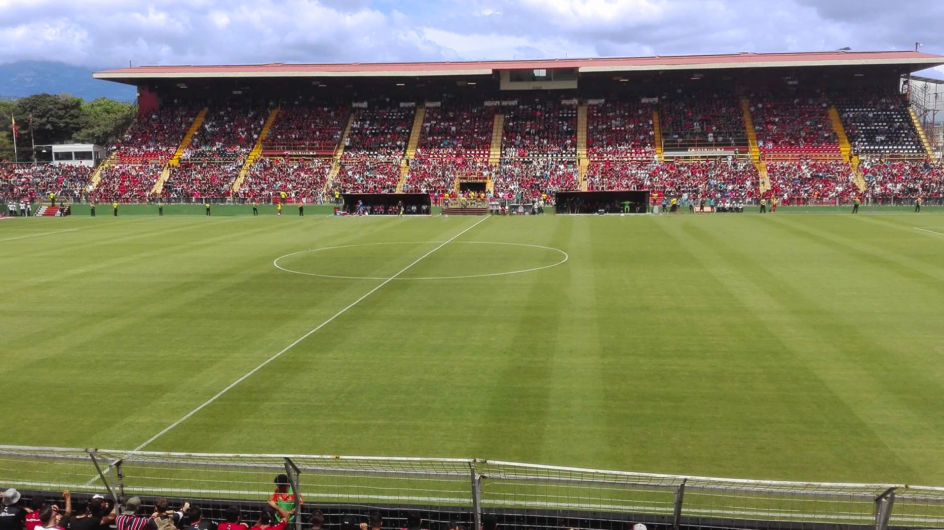 01-10-2017. Toma del Estadio Alejandro Morera Soto, con dos meses de inaugurada la gramilla híbrida.